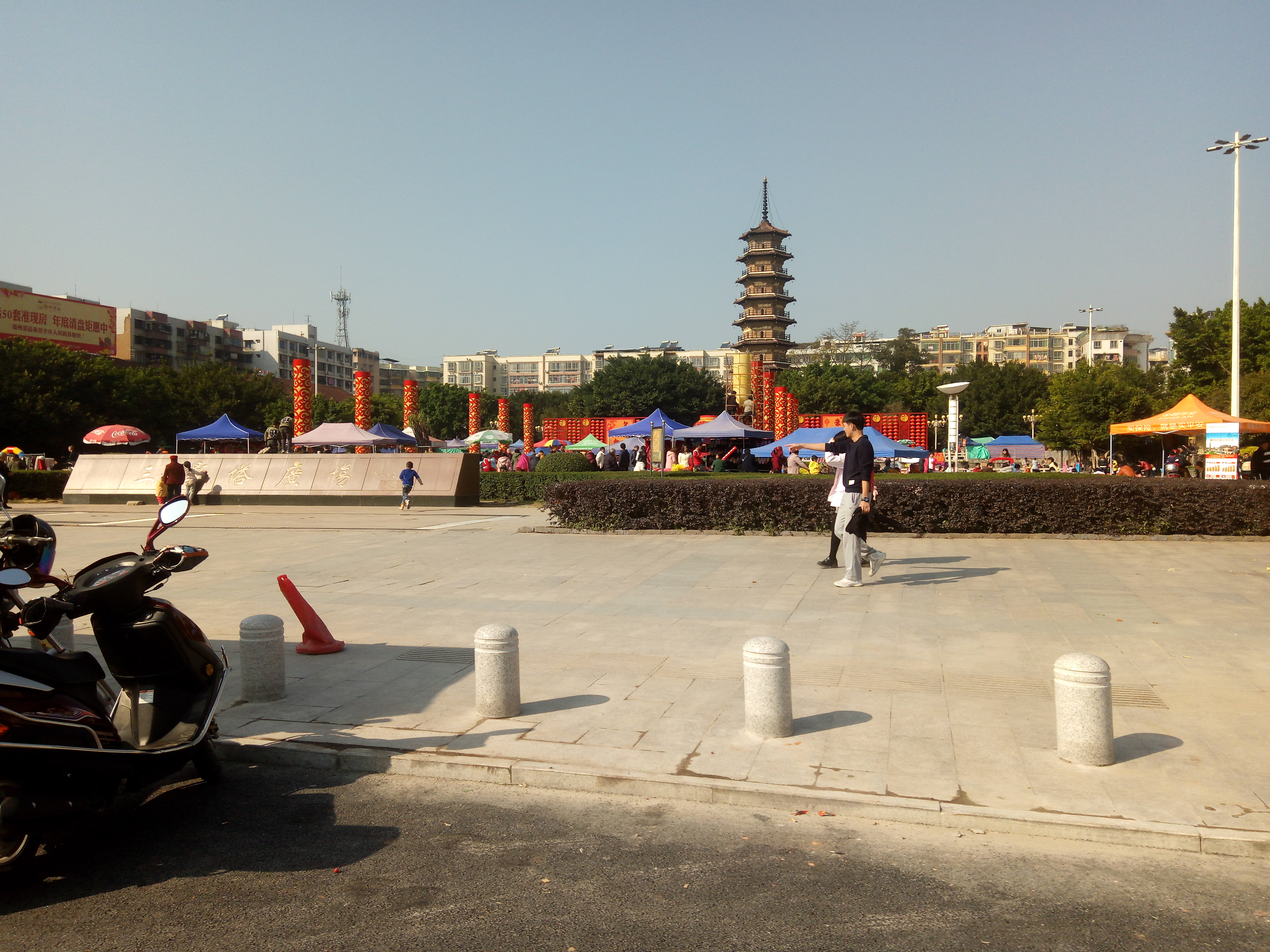 南雄市三影塔广场